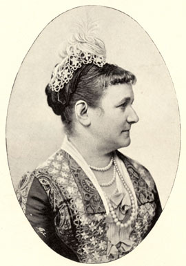 Königin Carola von Wasa-Holstein-Gottorp